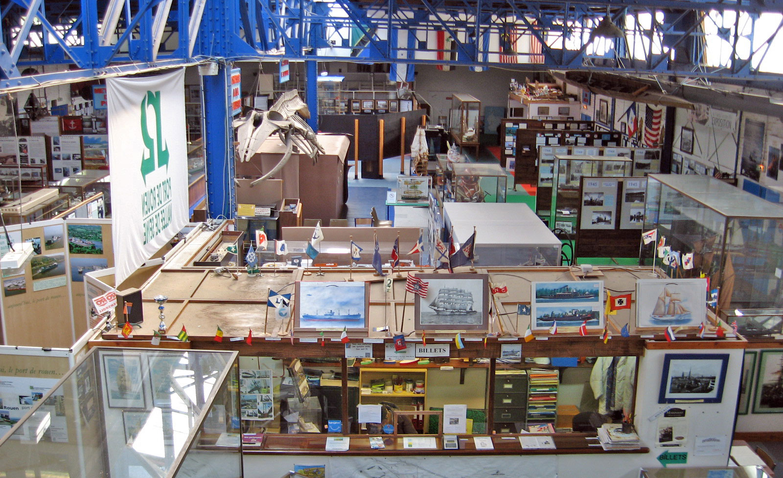 Rouen Musée Maritme bannen.